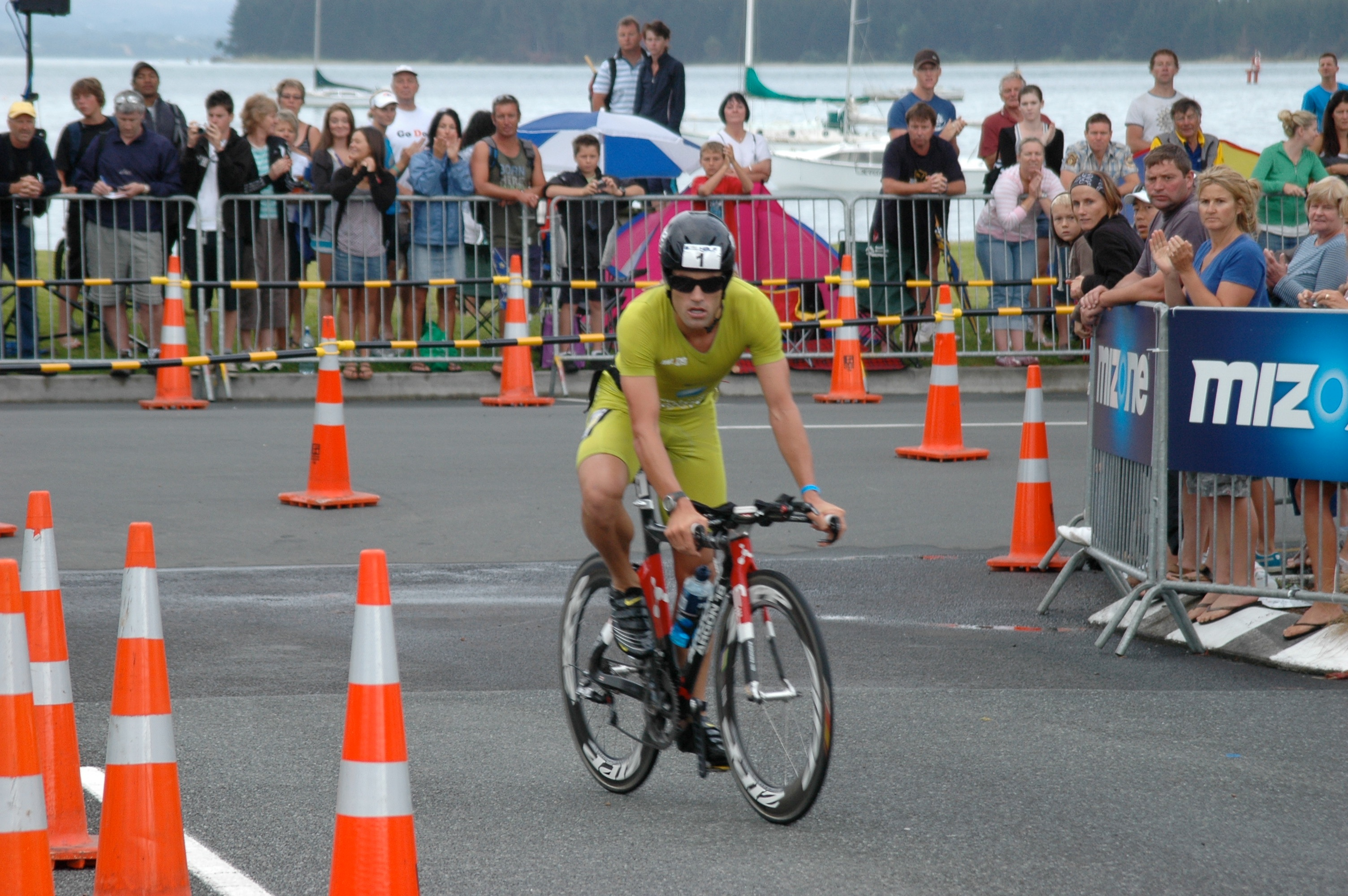 Kieran Doe at Tauranga Half Ironman 2009